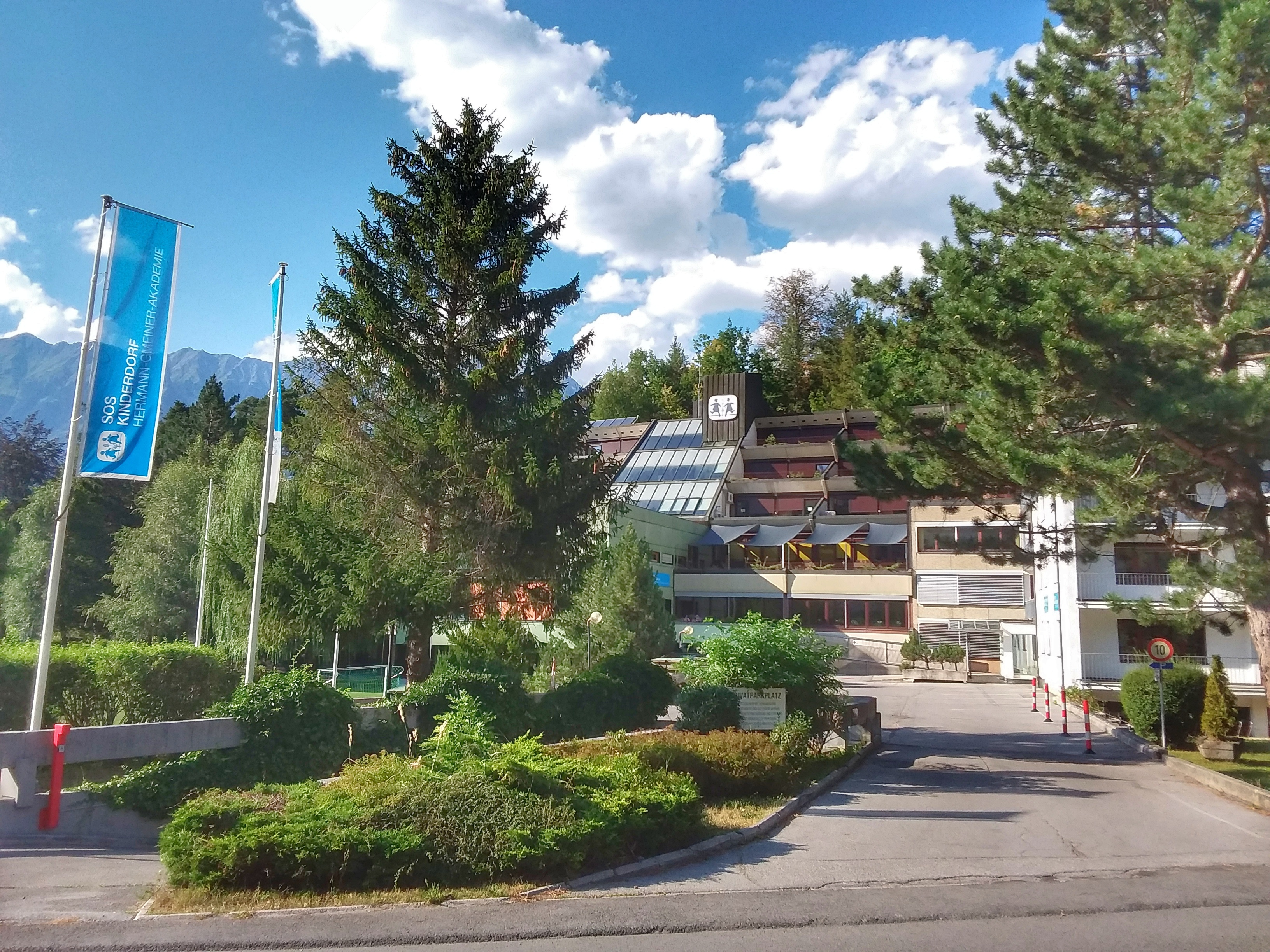 Akademie von SOS Kinderdorf International, Hermann Gmeiner Akademie mit Fussballplatz und Schwimmbad